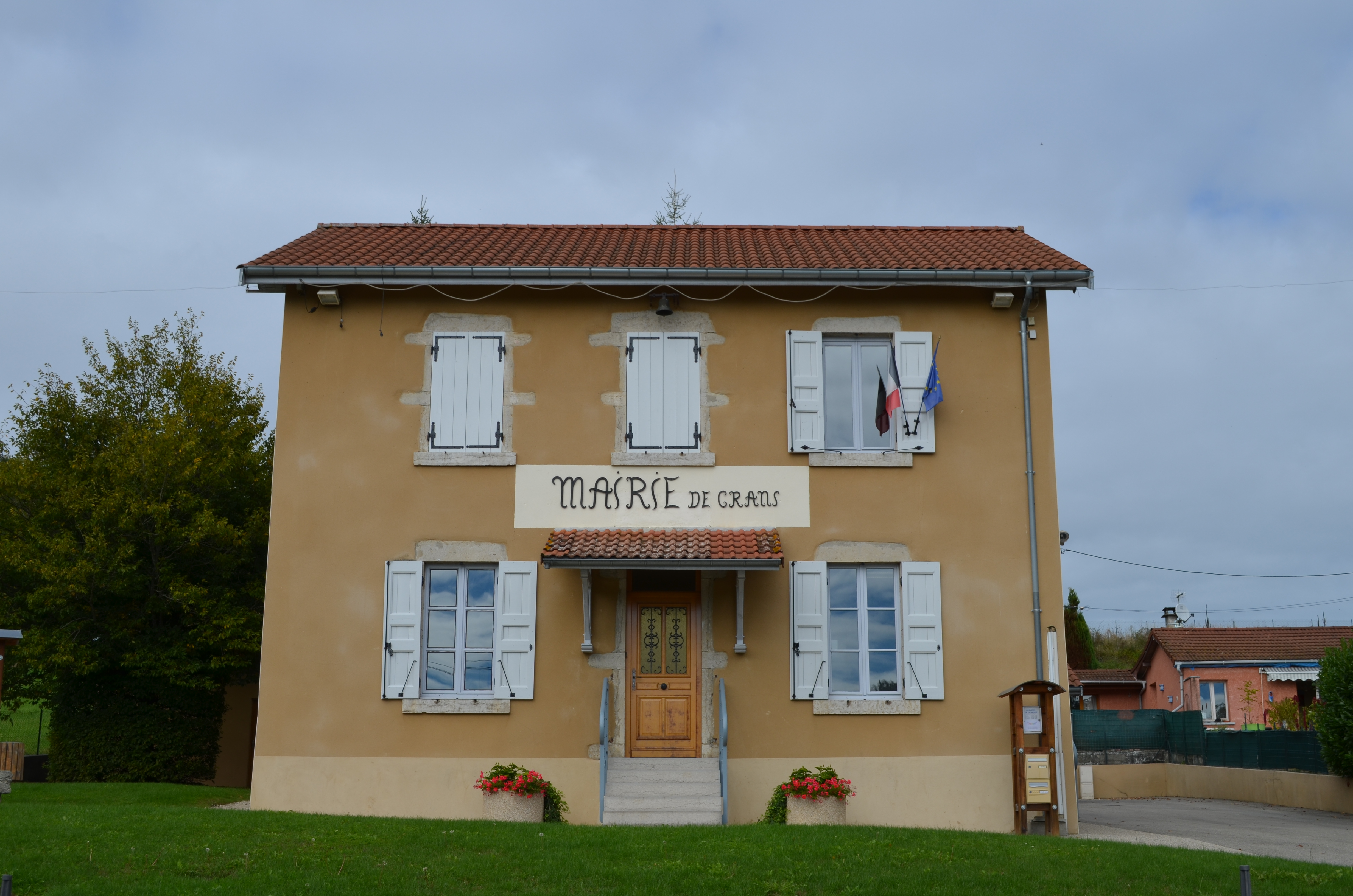 Mairie de Crans.